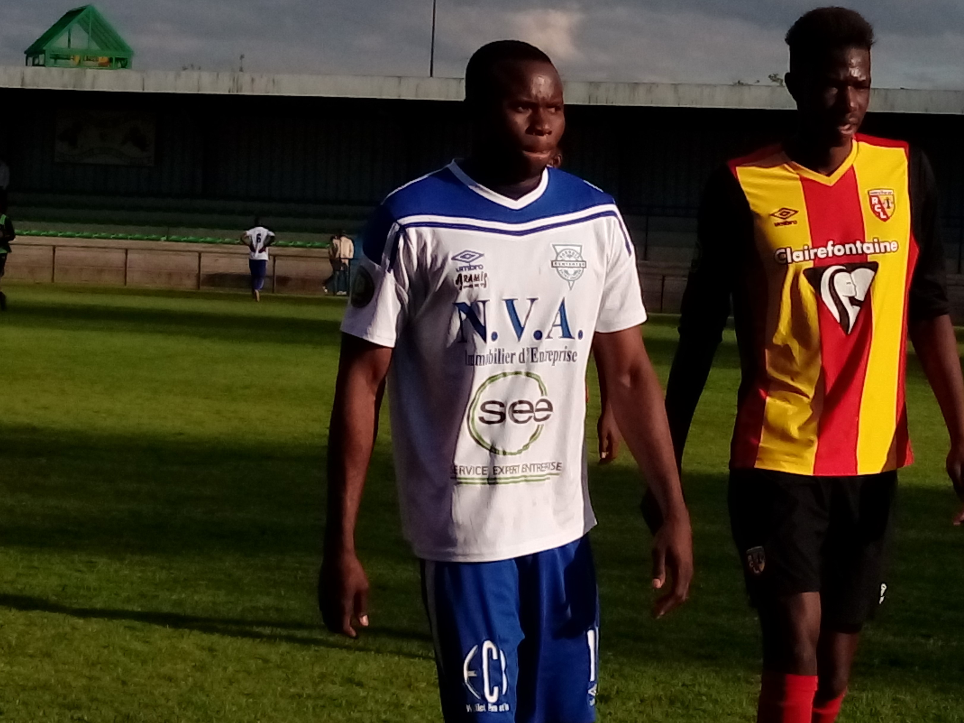 Patrick Etshimi lors du match Lens B / Entente SSG, comptant pour la vingt-septième journée du Championnat de CFA 2016-2017, le 22 avril 2017.